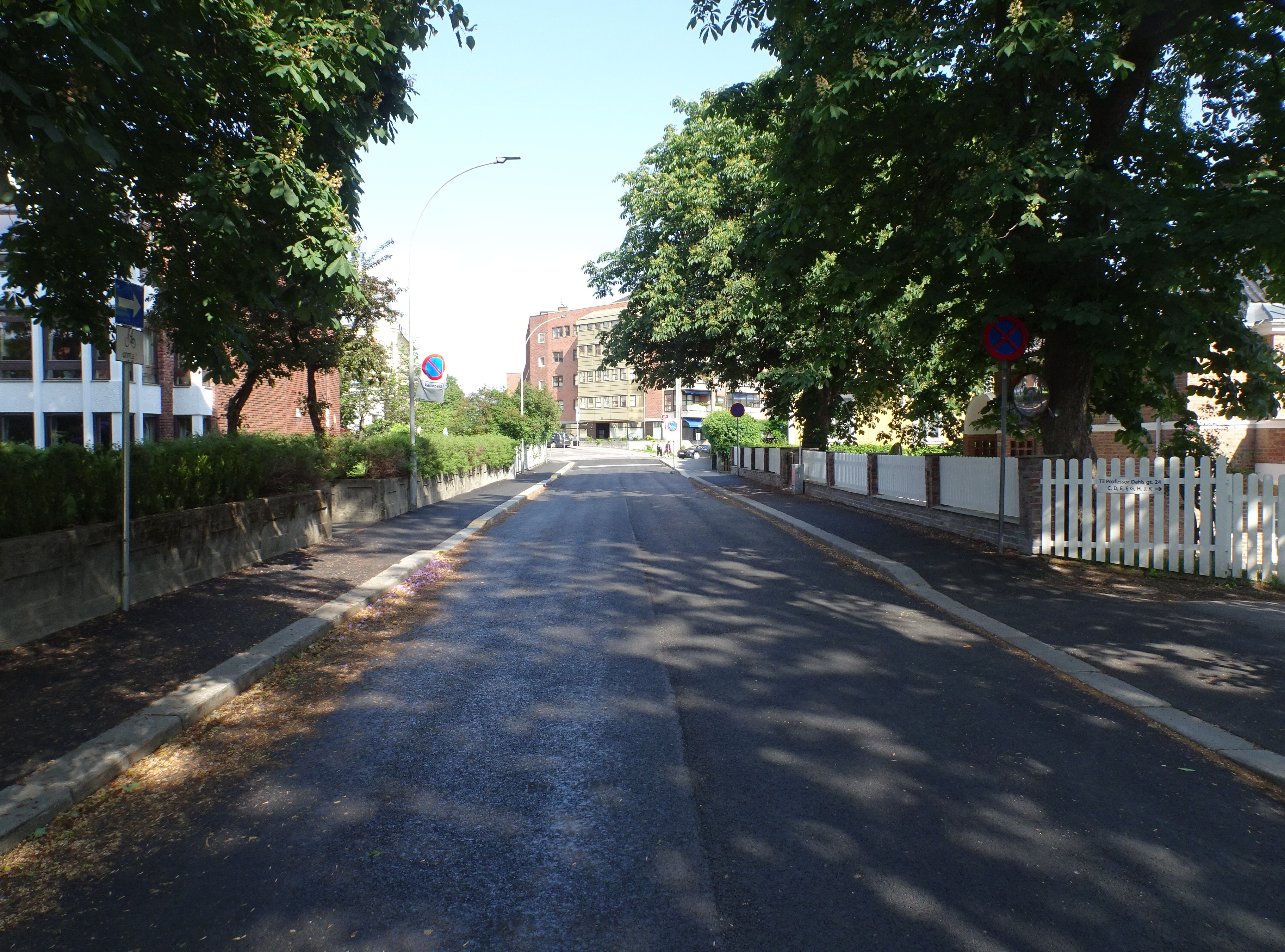 Professor Dahls gate fra Industrigata mot Uranienborgveien